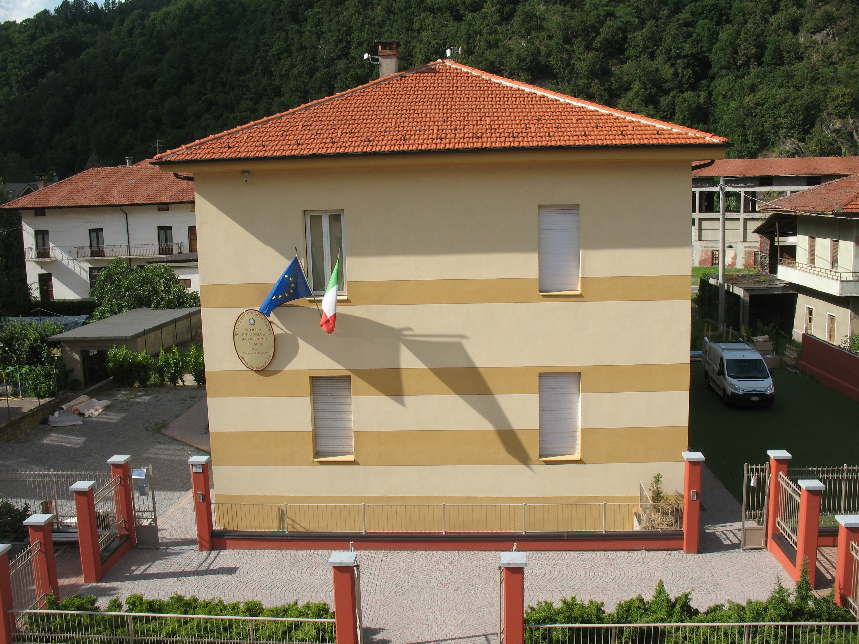 Scuola primaria e secondaria in Venasca im Varaitatal, Piemont